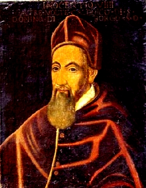 Inocêncio IX, Papa